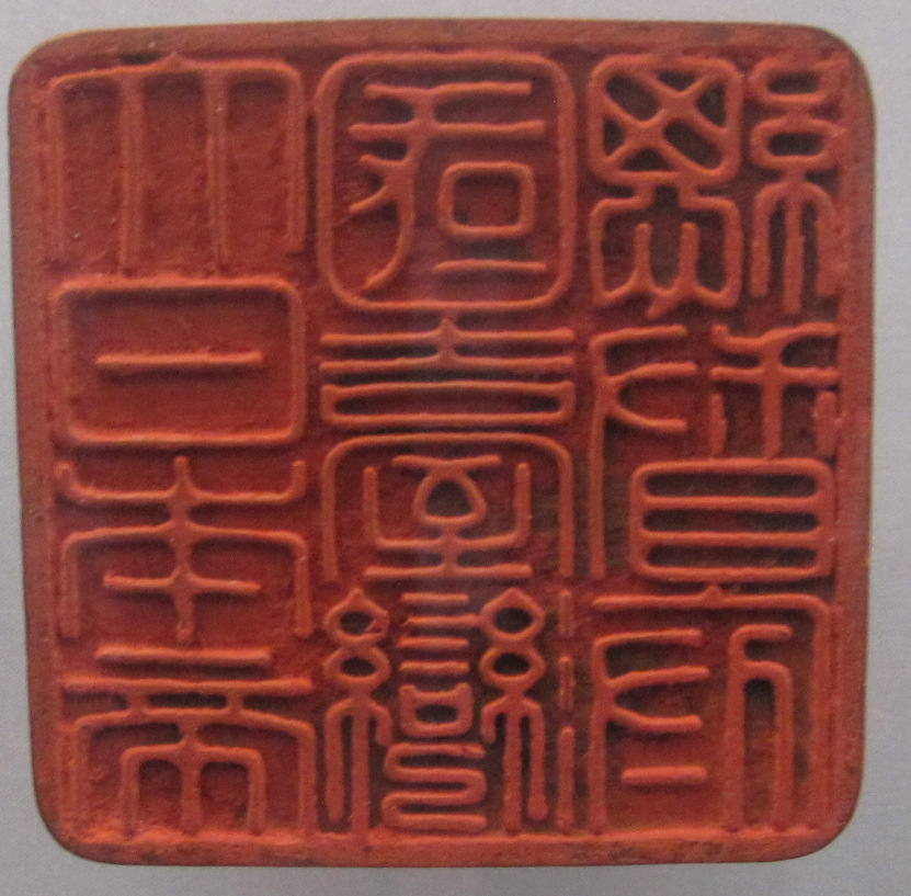 大日本帝國臺灣總督府。攝於臺灣歷史博物館。